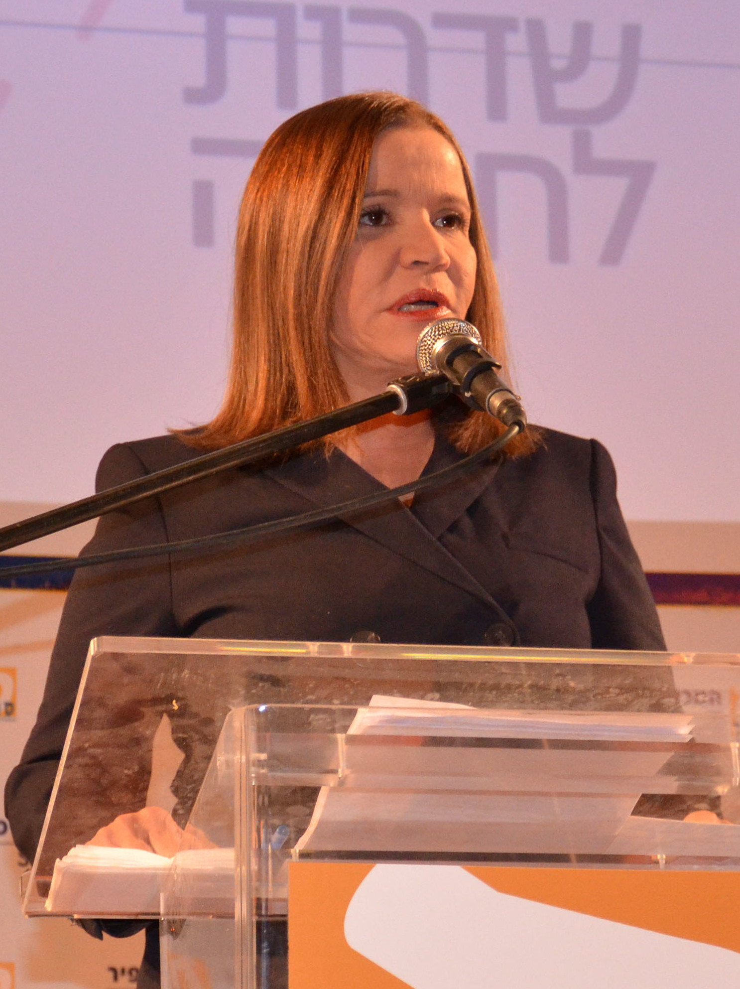 שלי יחימוביץ' בכנס שדרות לחברה במכללה האקדמית ספיר ובעיר שדרות 2015